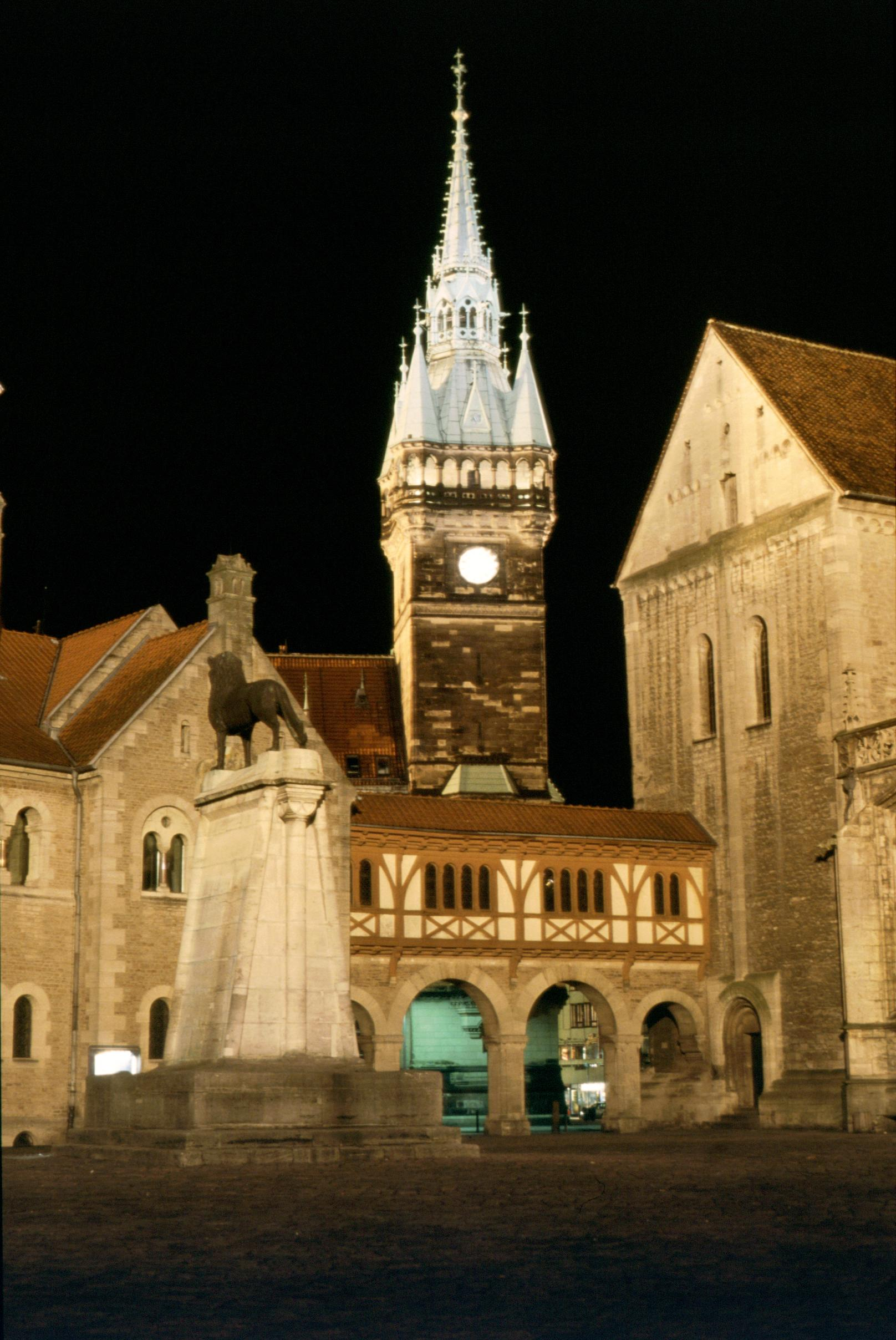 Burgplatz in Braunschweig, Germany January 2003 by Matthias Prinke